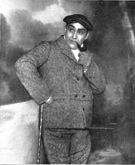 Fotografía del actor argentino Florencio Parravicini publicada en 1913 con motivo de su interpretación en el Teatro de la Comedia de la obra Fruta picada, pieza del dramaturgo también argentino Enrique García Velloso